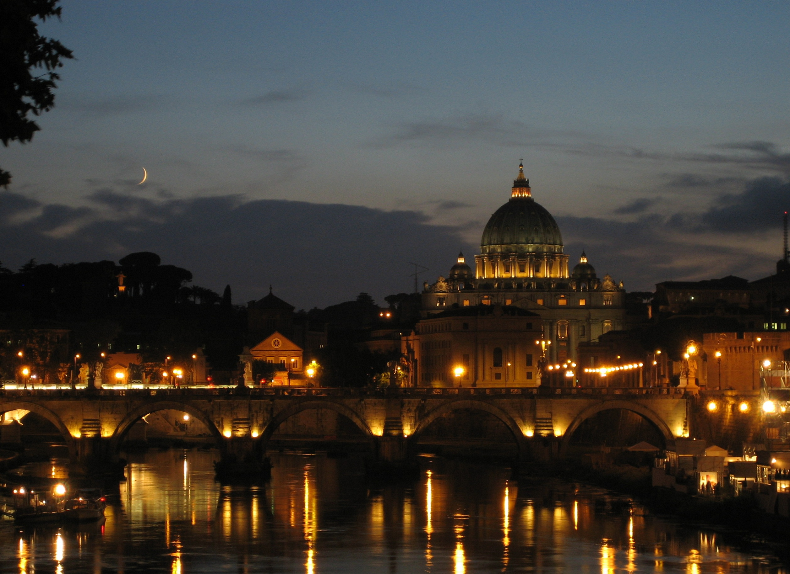 Rom_Petersdom_und_Tiberbruecke